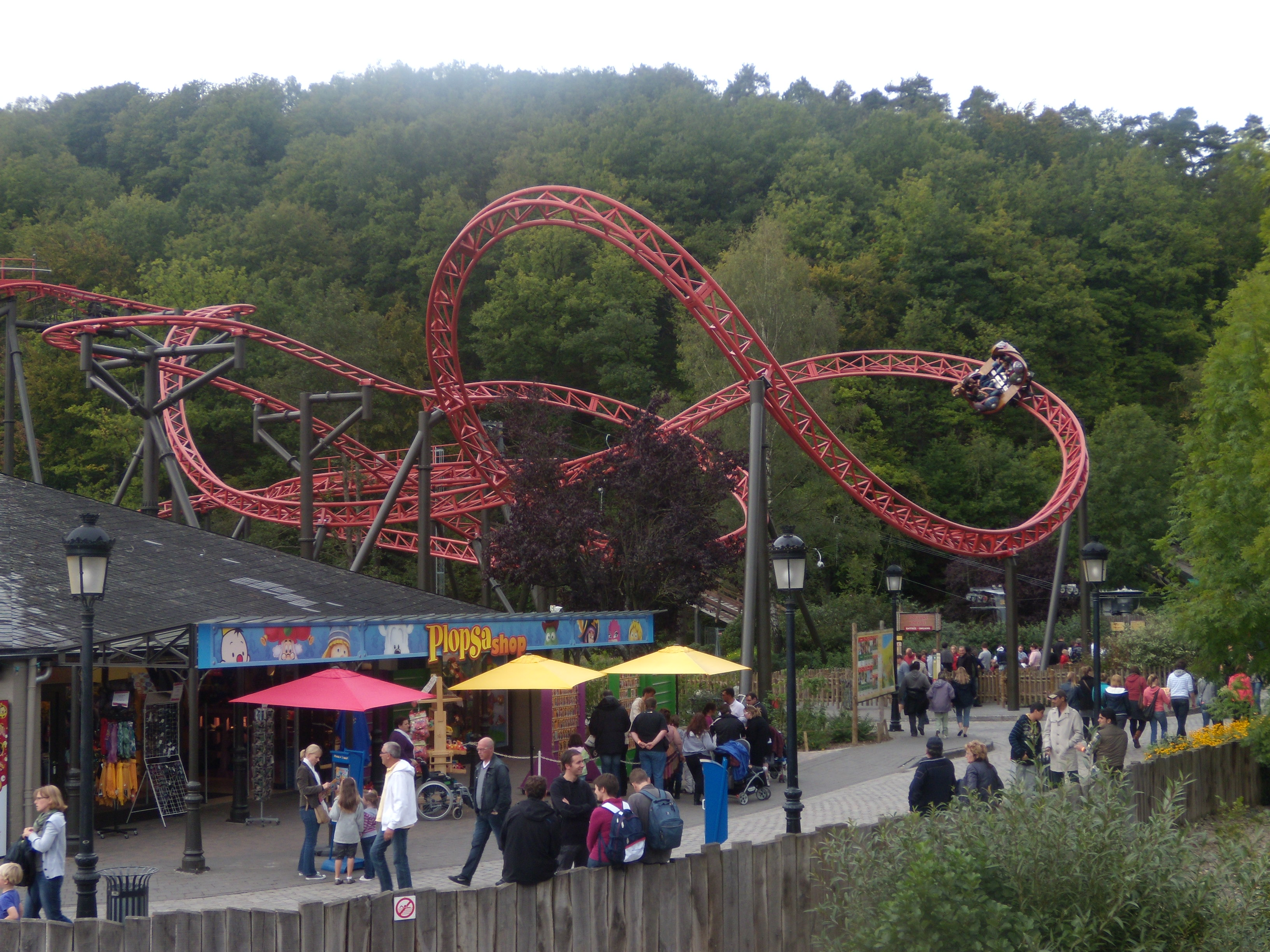 Montagnes russes Wickie The Ride à Plopsa Coo, Belgique.